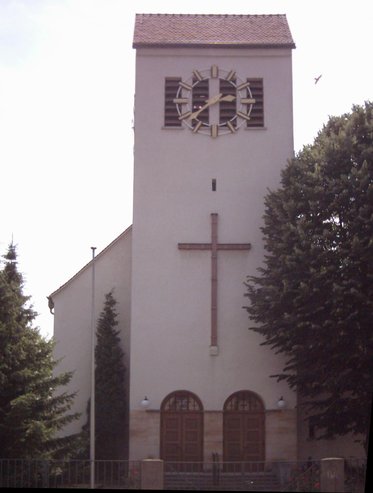 Evangelische Lutherkirche in Bieber, Aschaffenburger Str. (Hauptstraße)